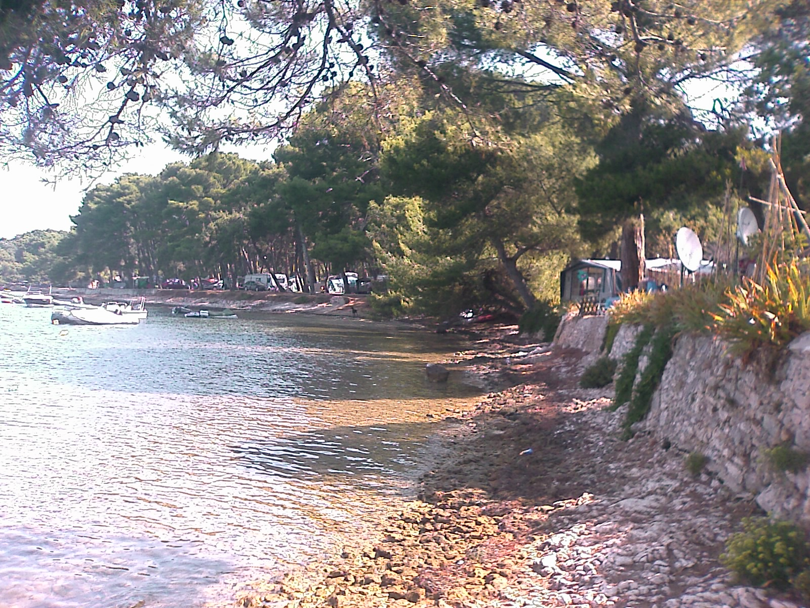 Medulin, Croatia